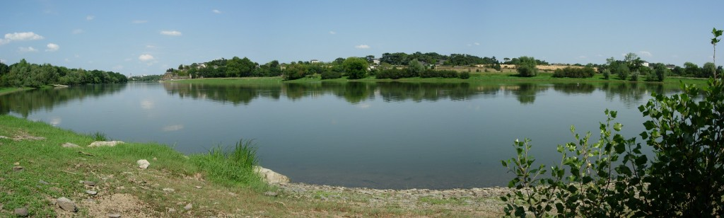 Photographie panoramique de la Maine, en aval de la ville d'Angers (Maine-et-Loire, France). Obtenue par compositage de 3 photos.